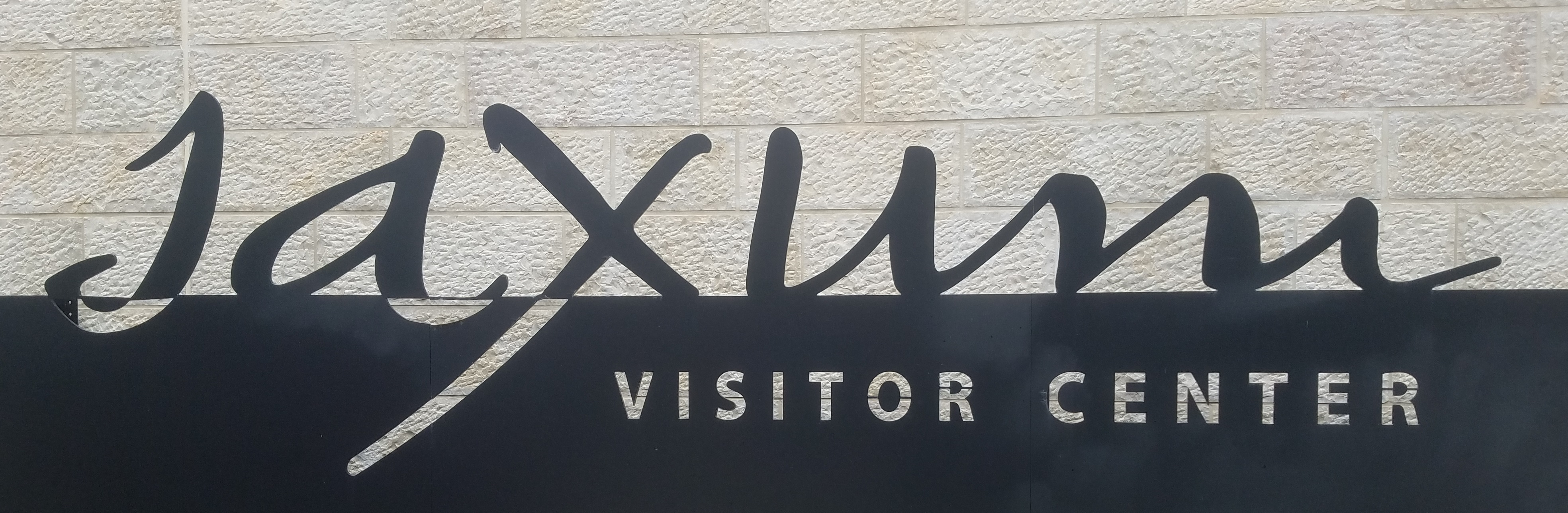 הכניסה לסאקסום